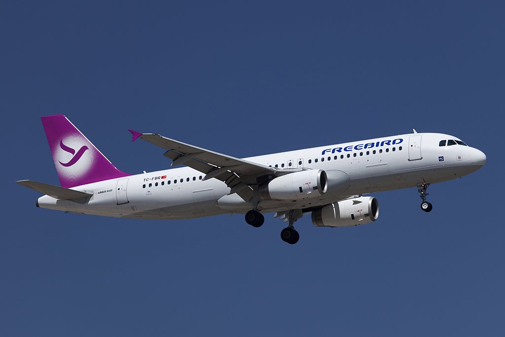 TC-FBR A320 Freebird